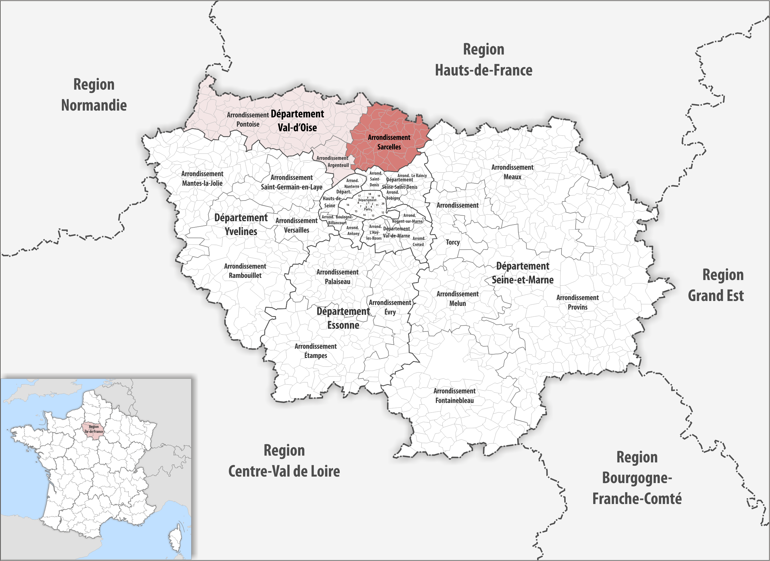 Lage des Arrondissements Sarcelles